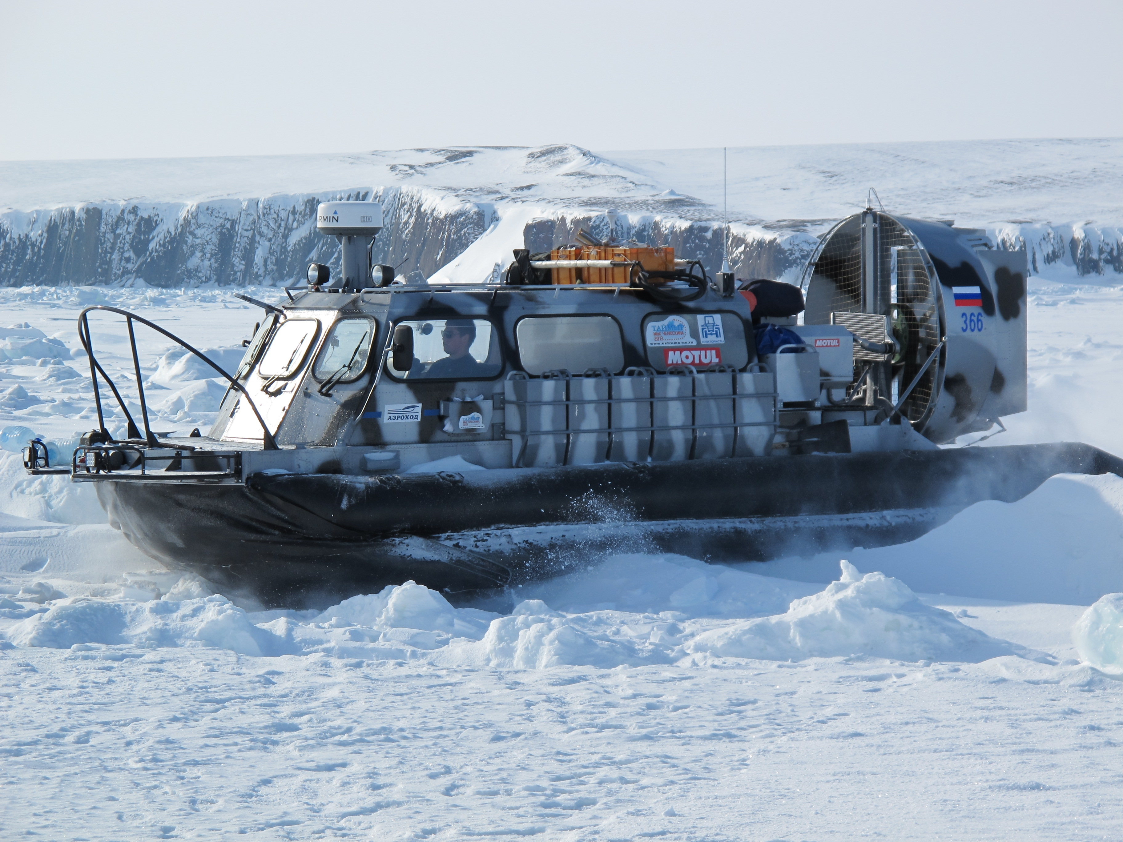 Экспедиция на Таймыре на 2-х судах воздушной подушке Хивус-10 в апреле 2013 года.